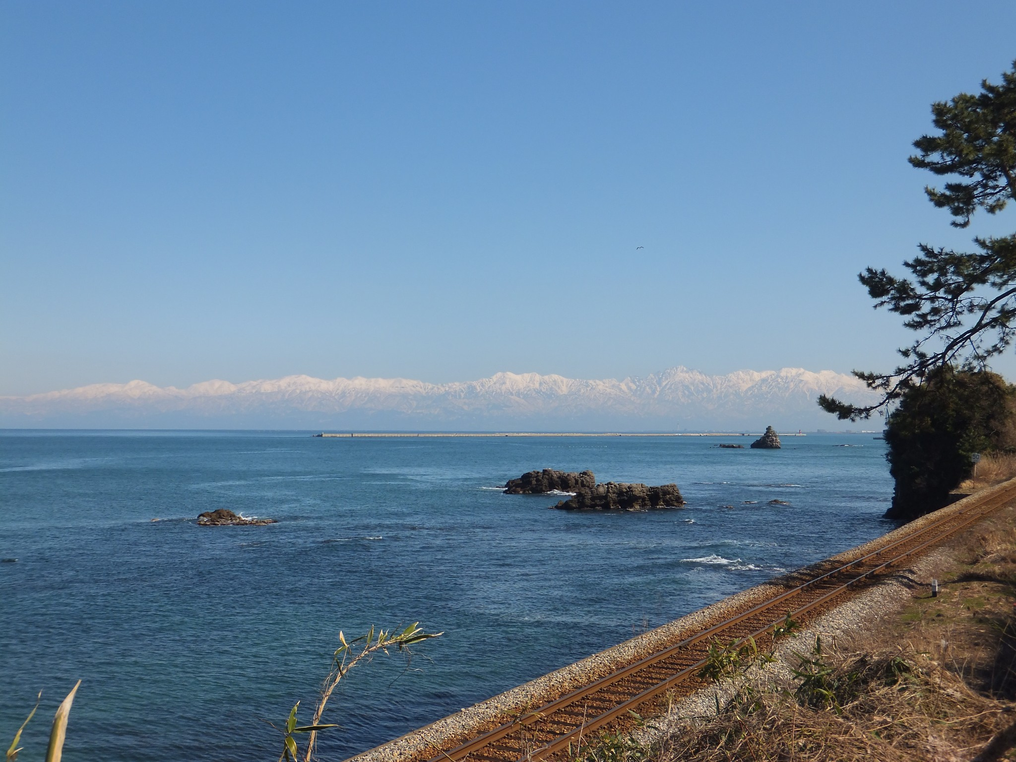 Ota, Takaoka, Toyama Prefecture 933-0133, Japan